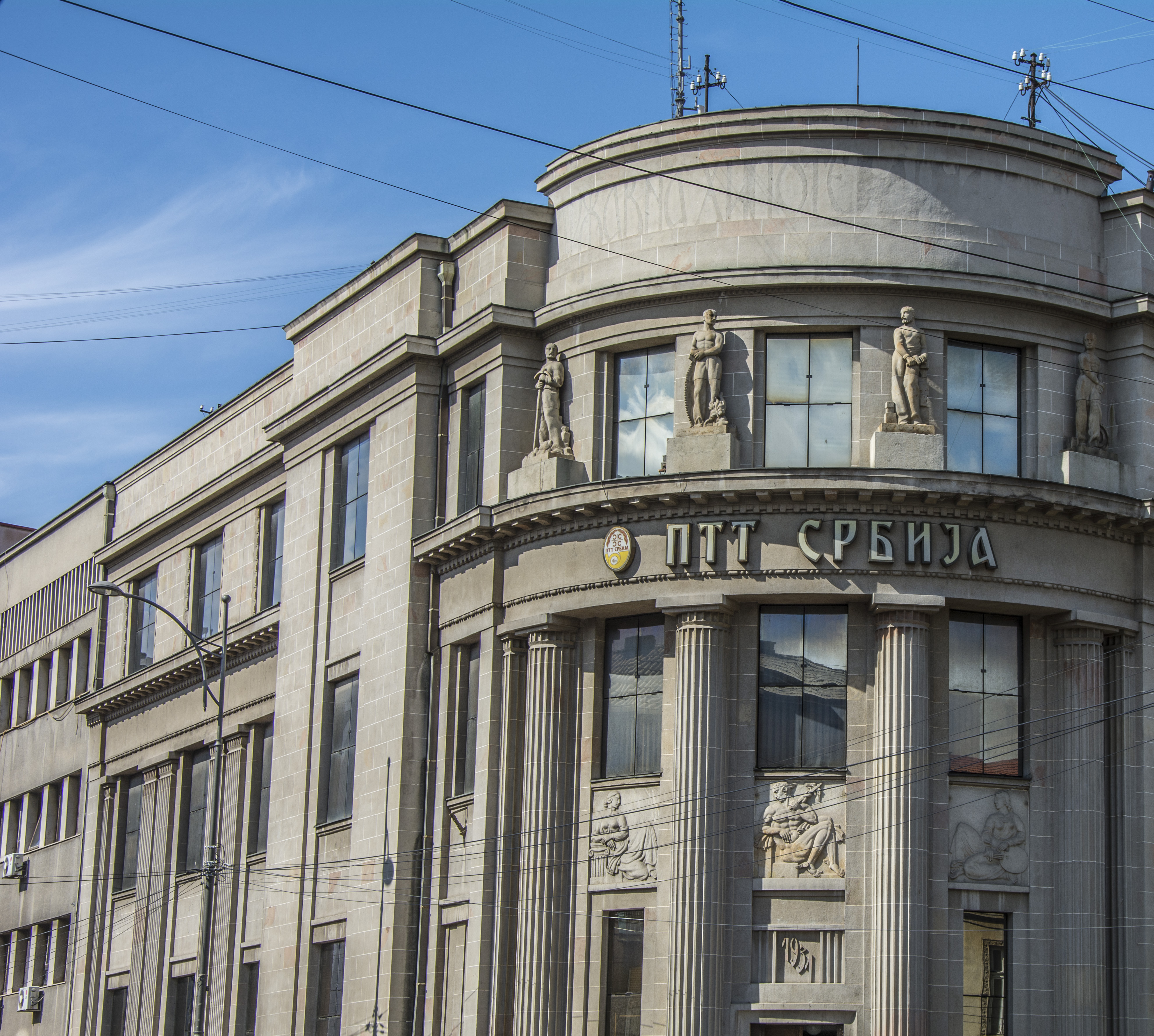 Град Ниш